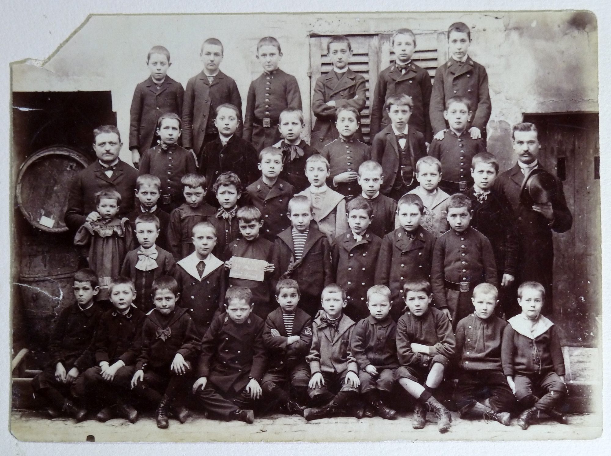 Photo de classe, école primaire de Taverny (Seine-et-Oise), vers 1880 (?). Des élèves portent un uniforme de lycéens. Photographe inconnu. Dimension cliché : 17 x 12 cm. Taverny - 25 mars - Sicard.